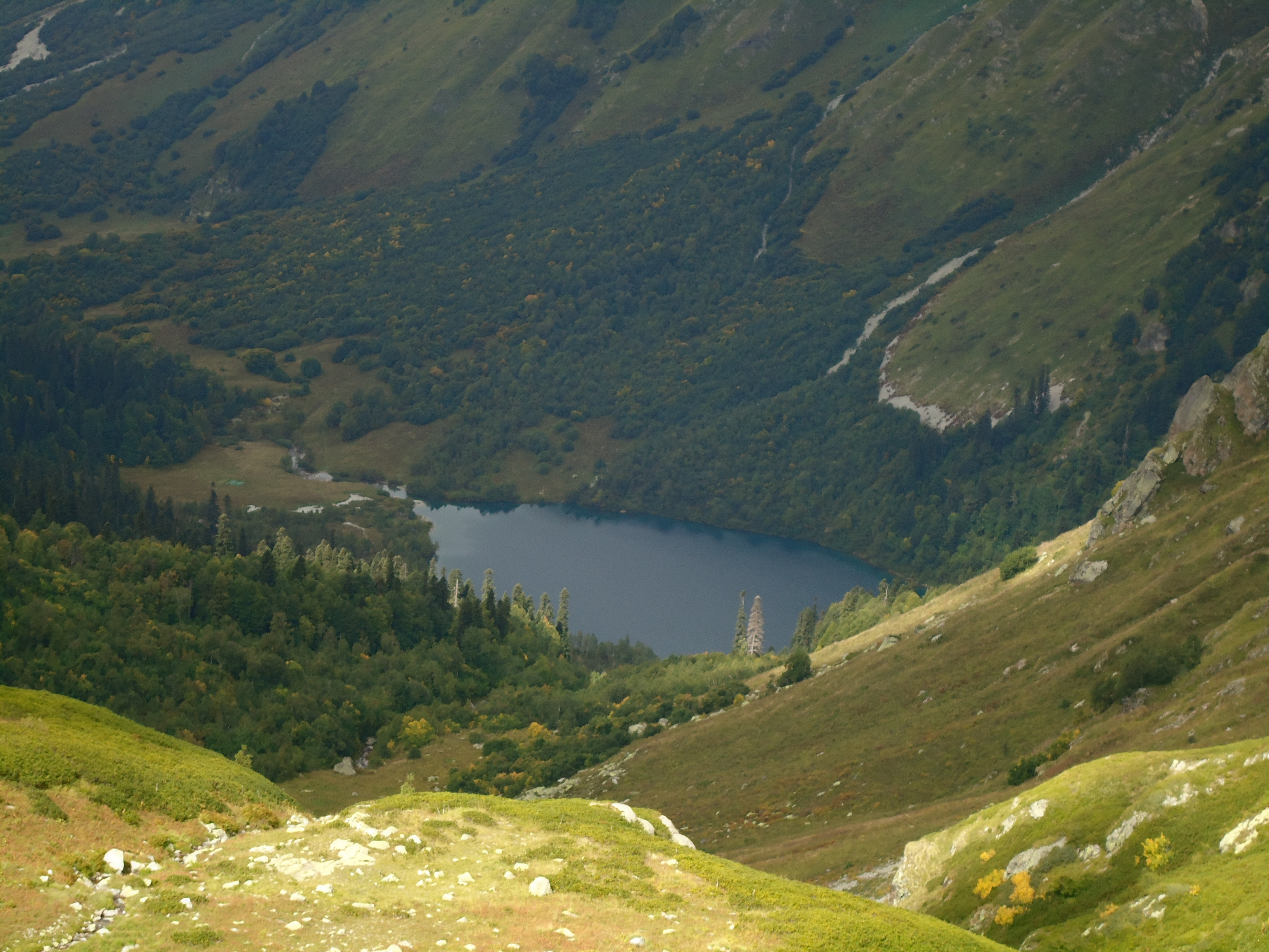 Озеро Кардывач, Сочи Территория Кавказского биосферного заповедника This image is related to the protected area of Russia number 2320405